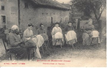 Dentellière de Mirecourt